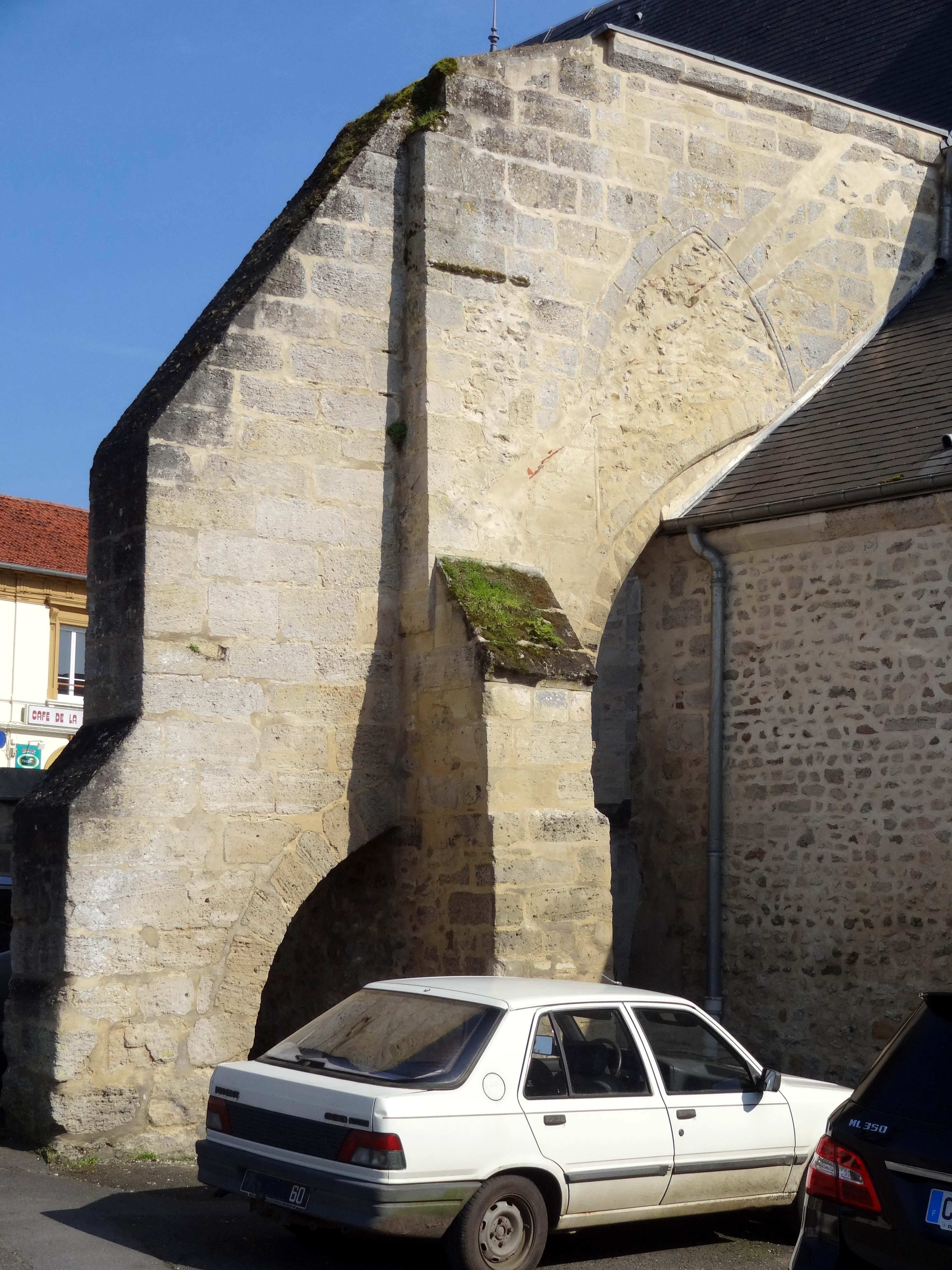 Église Saint-Vincent d'Hermes - voir titre.